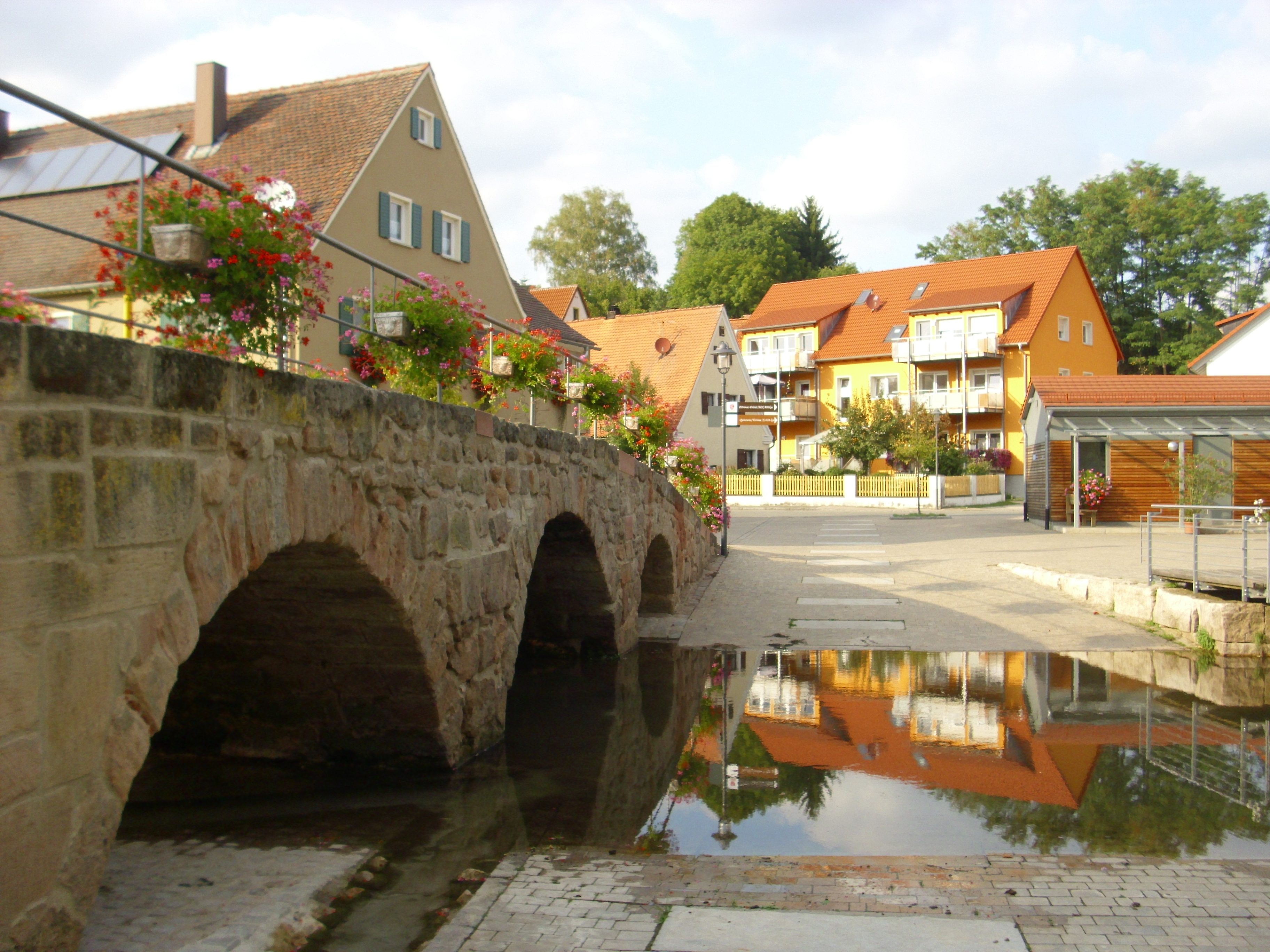 Alte Aurachbrücke in Barthelmesaurach 19